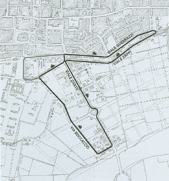 Pianta del secondo circuito cittadino di Imola, che fu utilizzato dal it:1947 al it:1950.